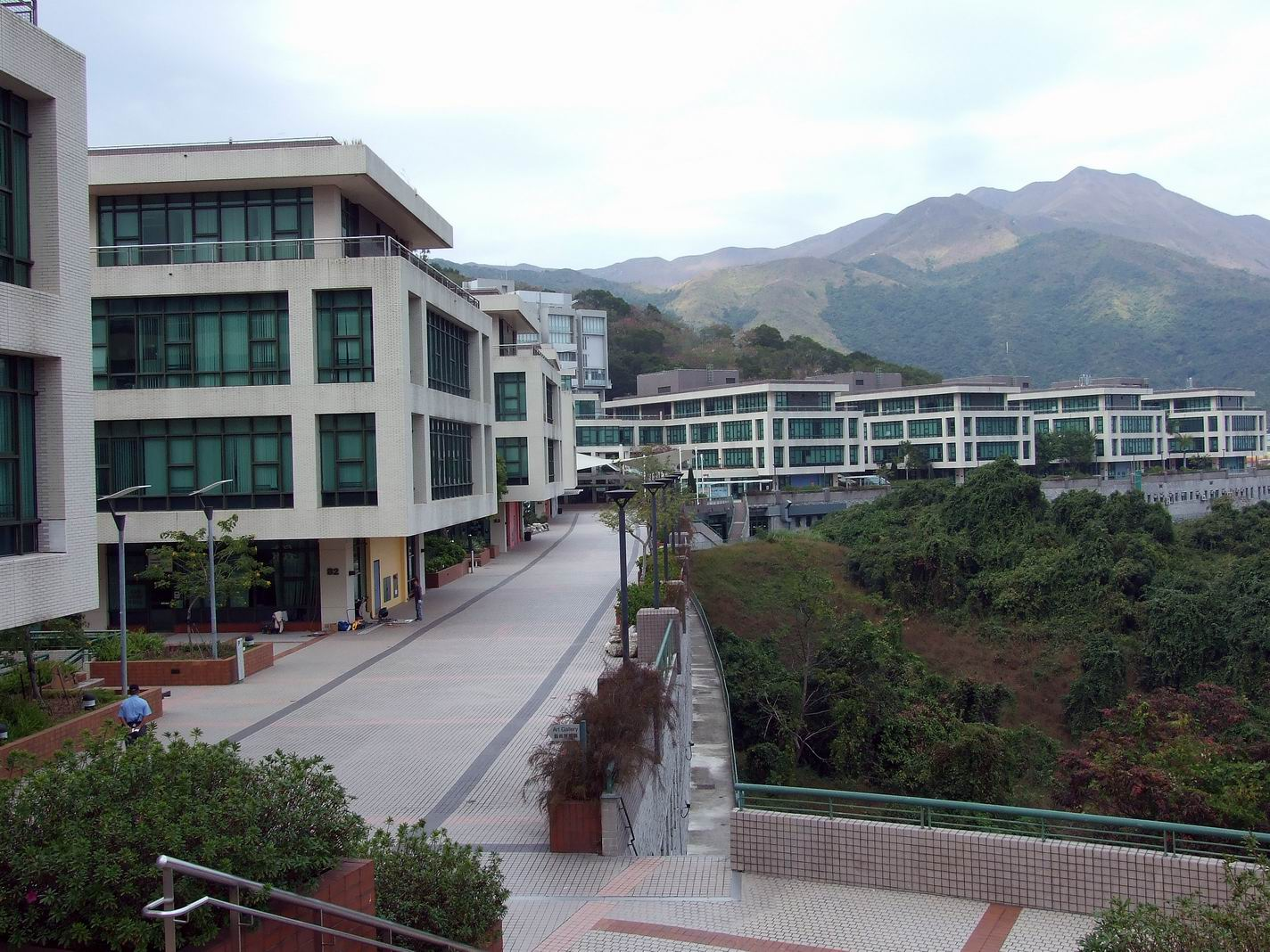 香港教育學院教學大樓南冀及北冀